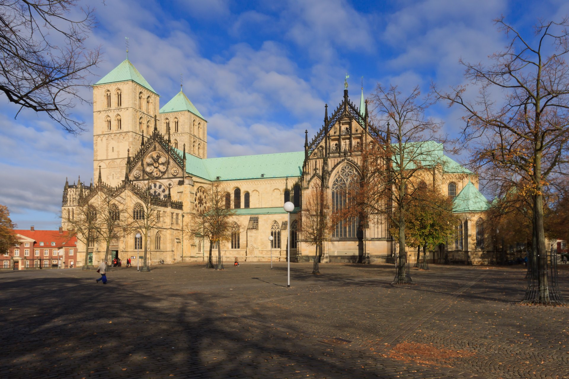 Der St-Paulus-Dom in Münster (Westfalen)